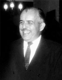 José Joaquim como presidente do IBGE, de 1961 a 1963